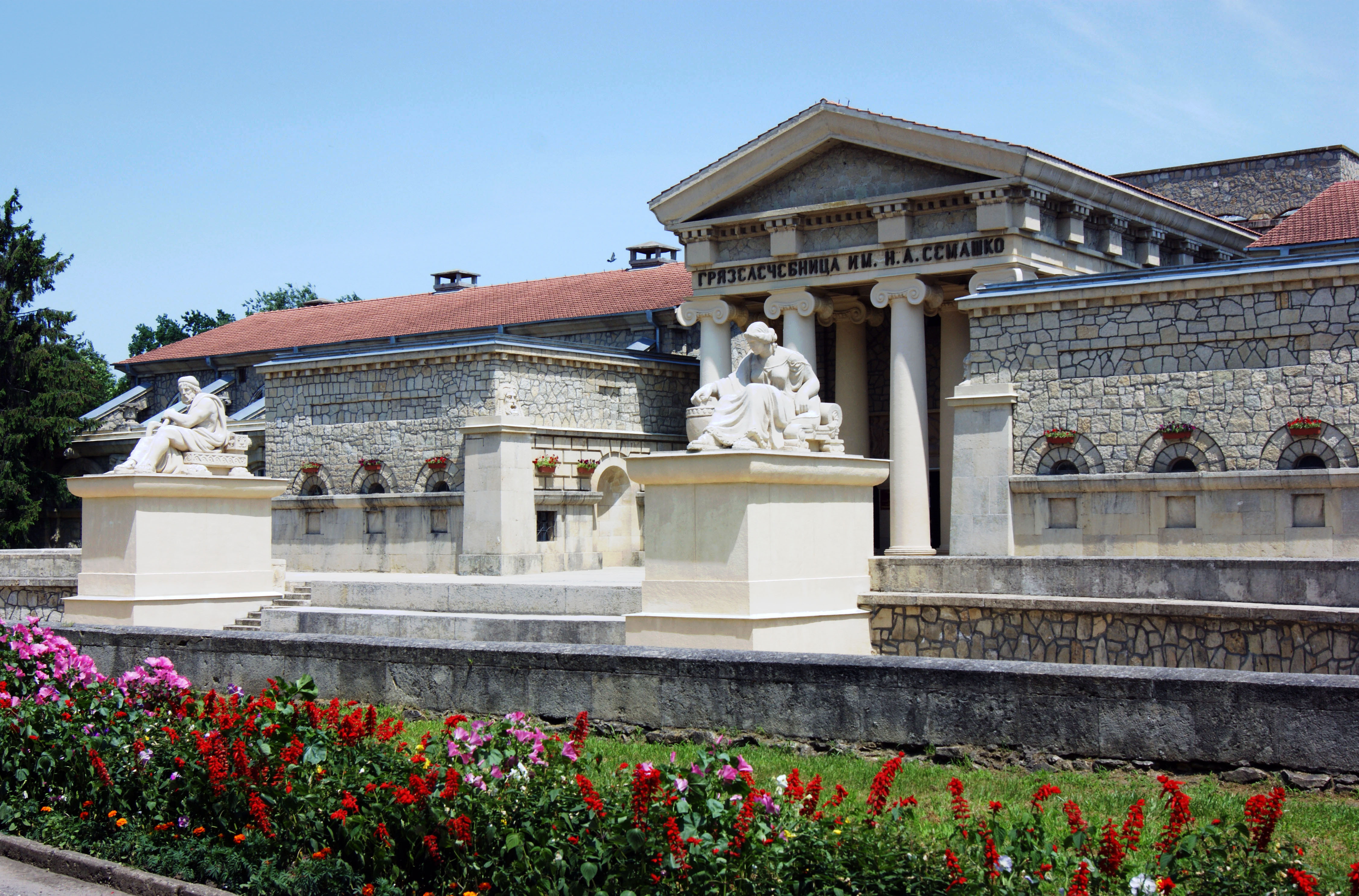 Парадный вход грязелечебницы, построенной в 1914 г., Архитектор Е.Р.Шретер